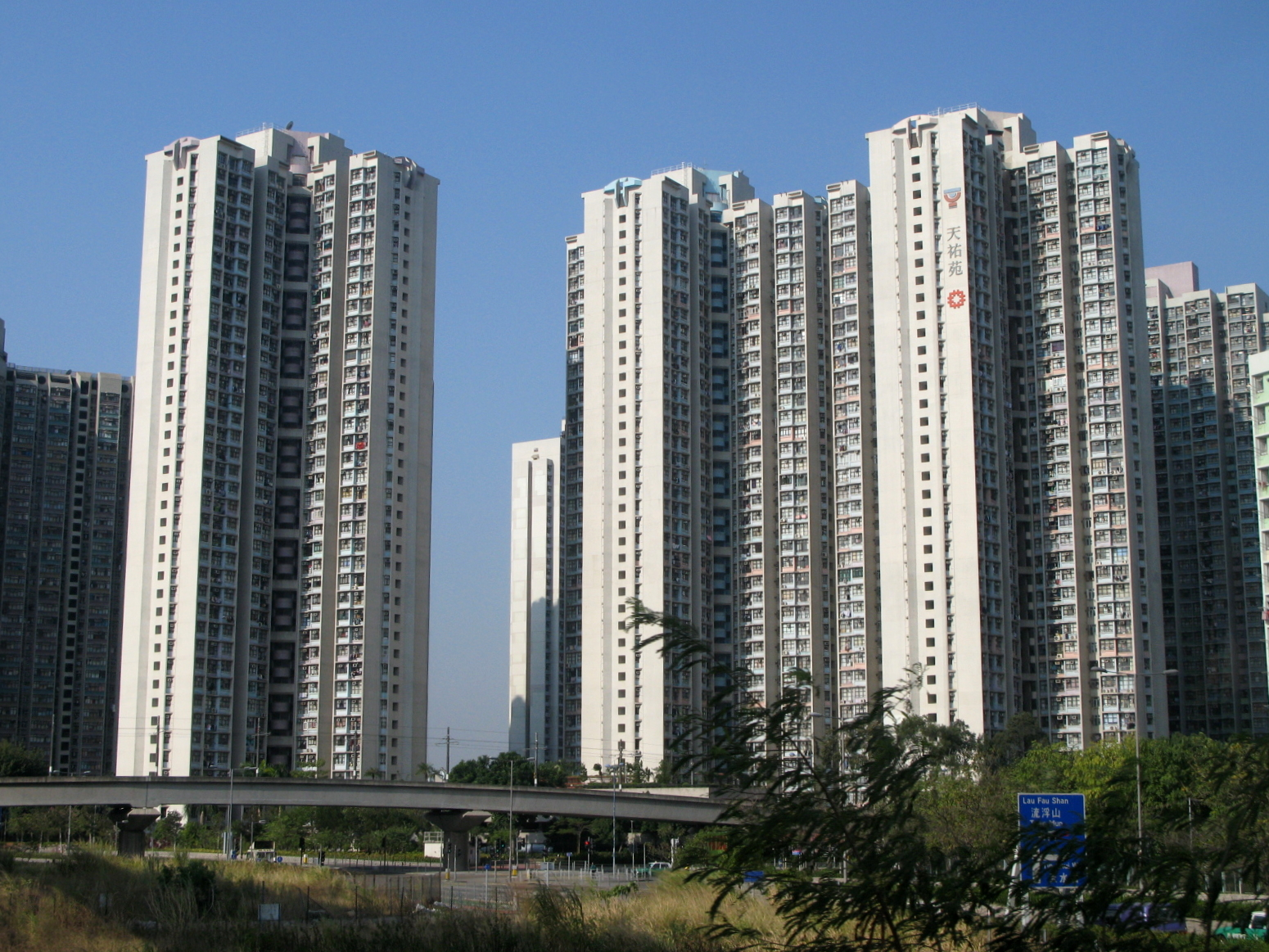 HK Tin Yau Court 天祐苑